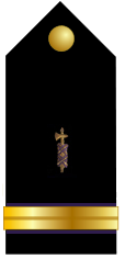 Pala de Teniente Auditor de la Armada española